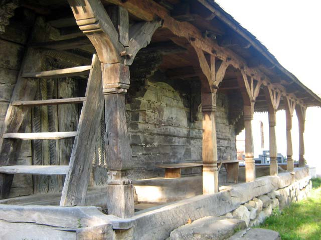 Creaca, Sălaj, biserica de lemn, pridvorul.